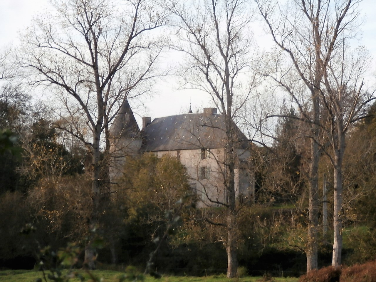 Château du XVe siècle (France, Limousin, Creuse)